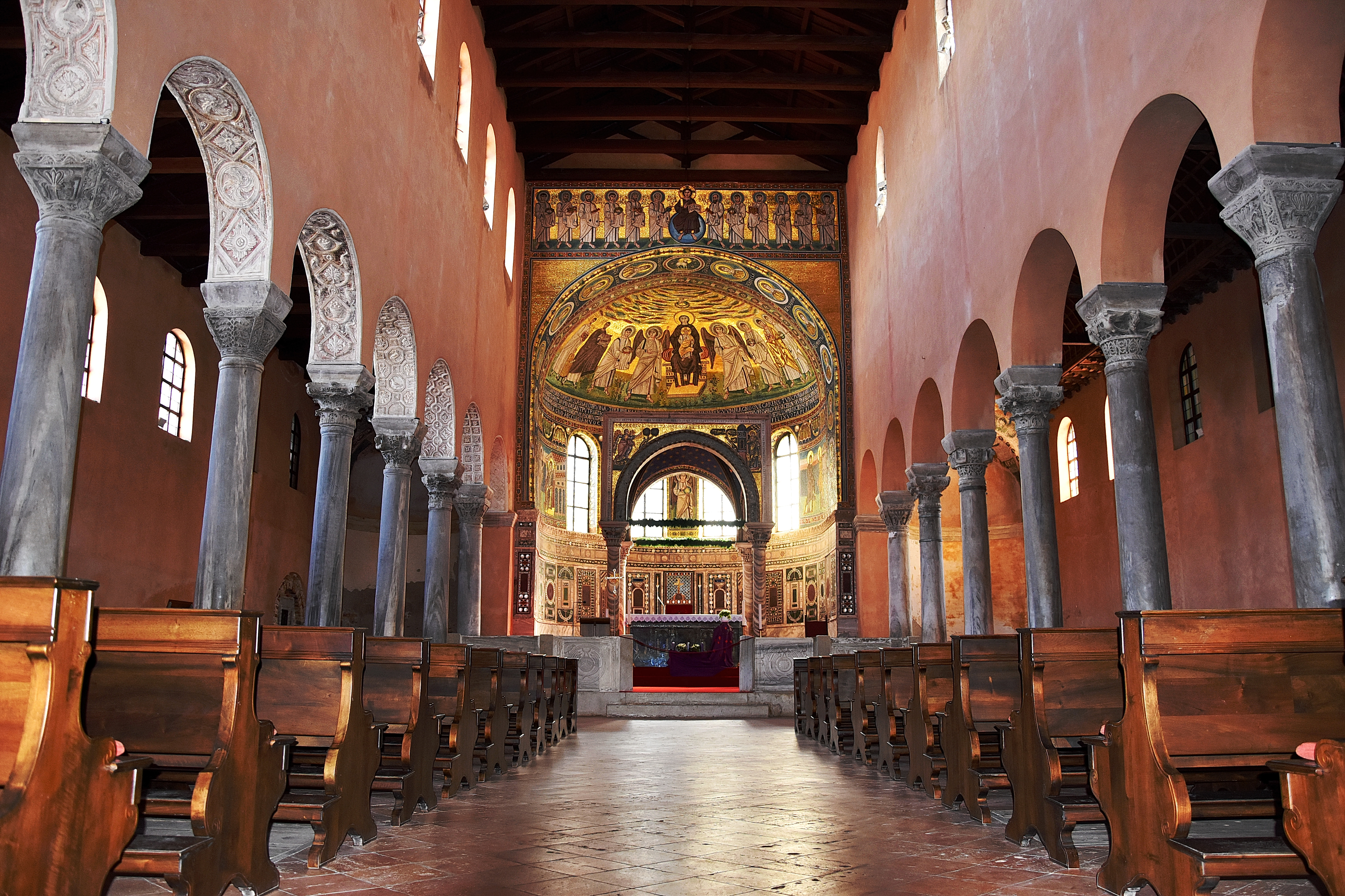 Kompleks Eufrazijeve bazilike